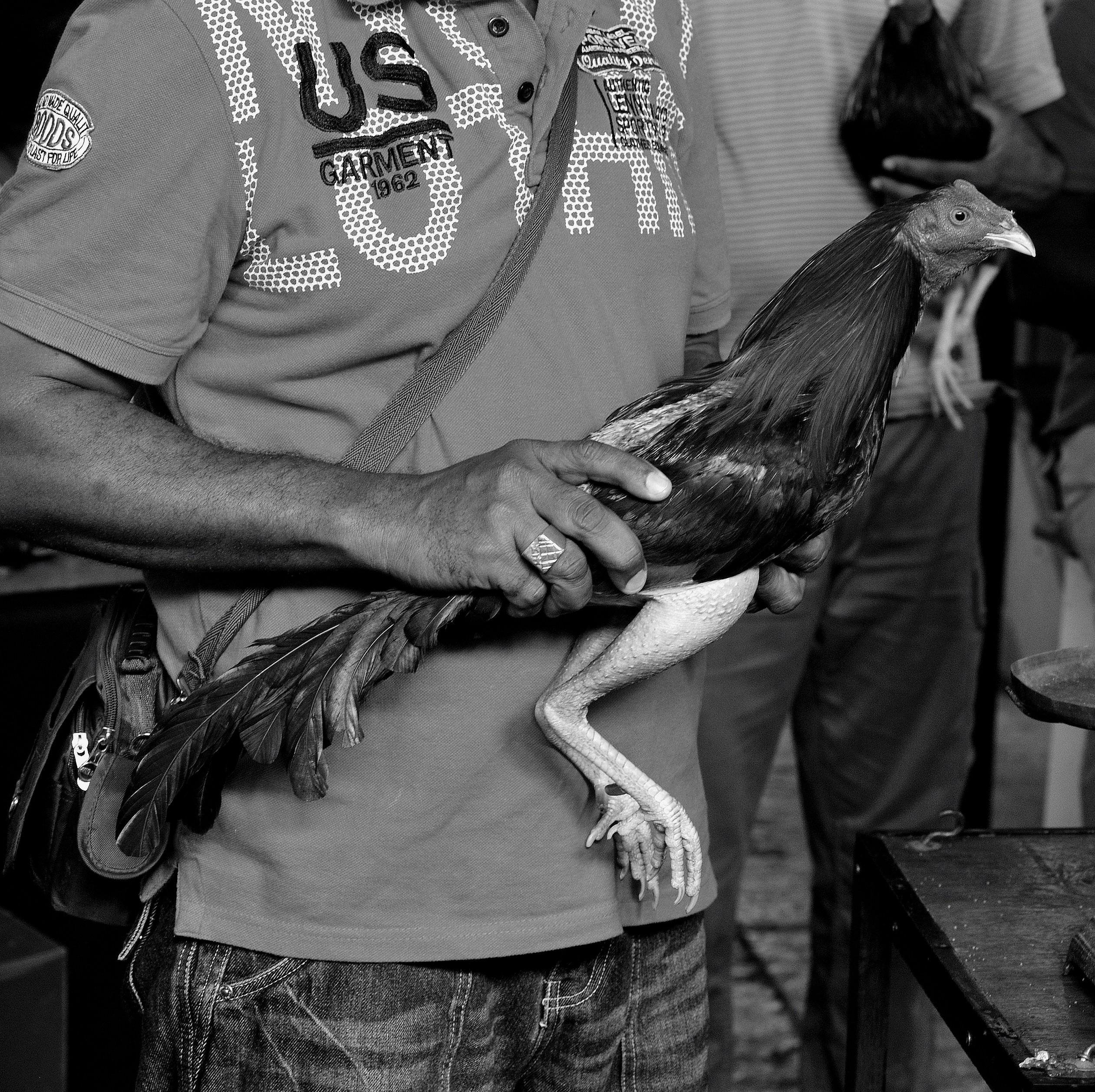 Martinique jeux loisirs Préparation au combat de coqs